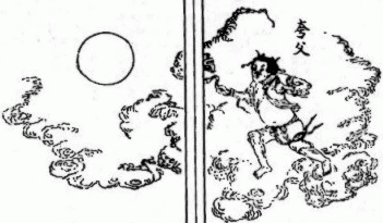 Kua Fu - Chinese giant